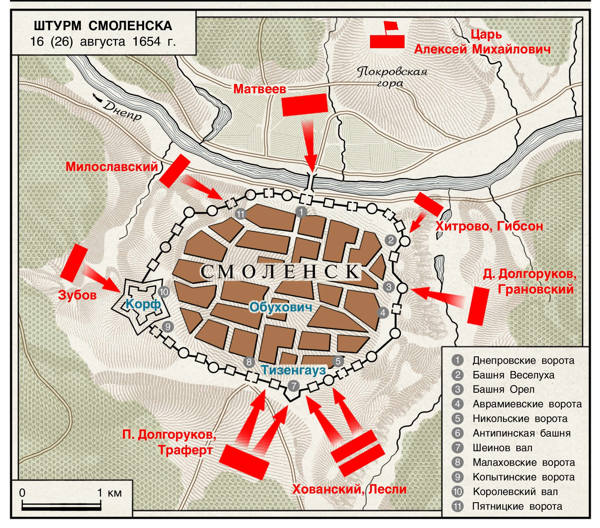 Схема штурма Смоленска 16 (26) августа 1654 года. в ходе русско-польской войны 1654-67 гг. Схема опубликована в монографии И.Б. Бабулина Смоленский поход и битва при Шепелевичах 1654 года. М.: Фонд «Ратное дело», 2018. Автор схемы Ю. Юров. Схема размещена с согласия И.Б. Бабулина